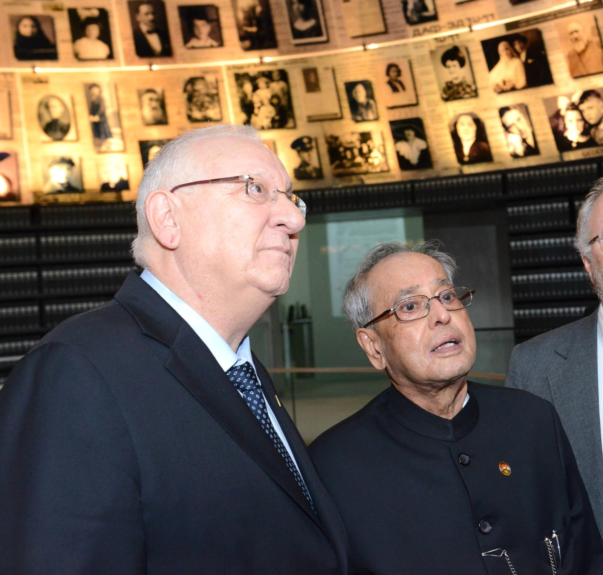 נשיא הודו פרנב מוקהרג'י יחד עם נשיא מדינת ישראל ראובן ריבלין בעת ביקורו ביד ושם בהיכל השמות